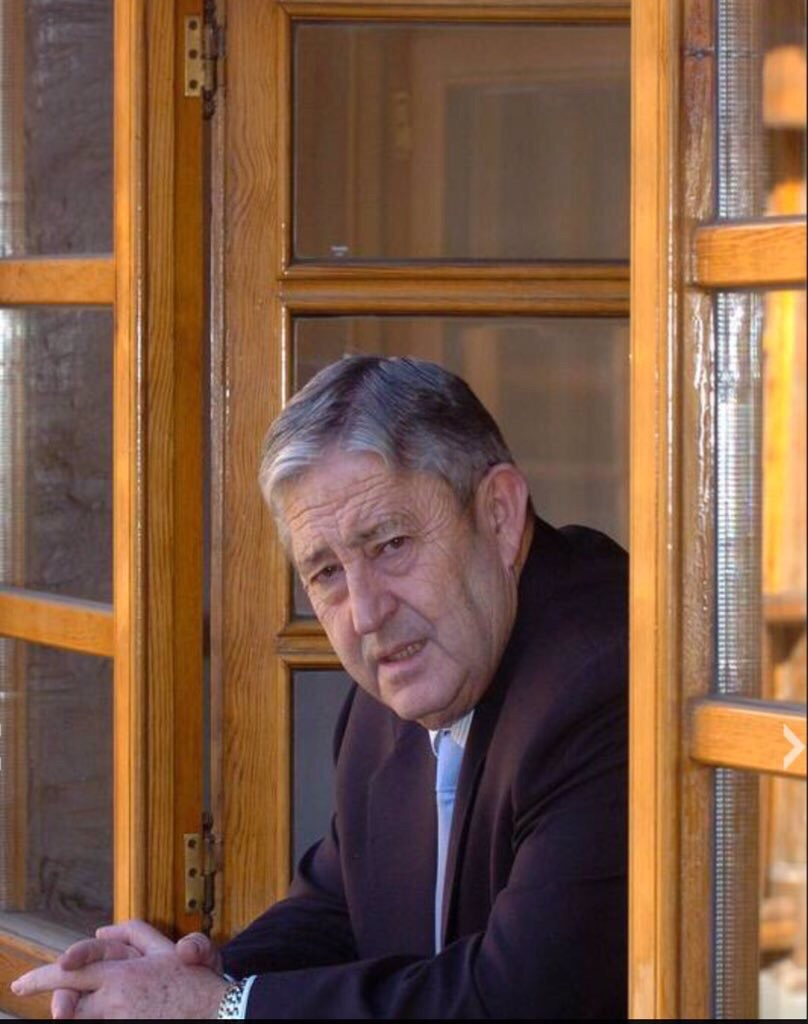 Dionisio Miguel Recio Política